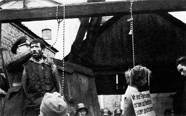 Résistante russe juive, pendue par les allemands le 26 octobre 1941. Photographie prise par un photographe lithuanien collaborateur des Nazis. Non identifié à ce jour.